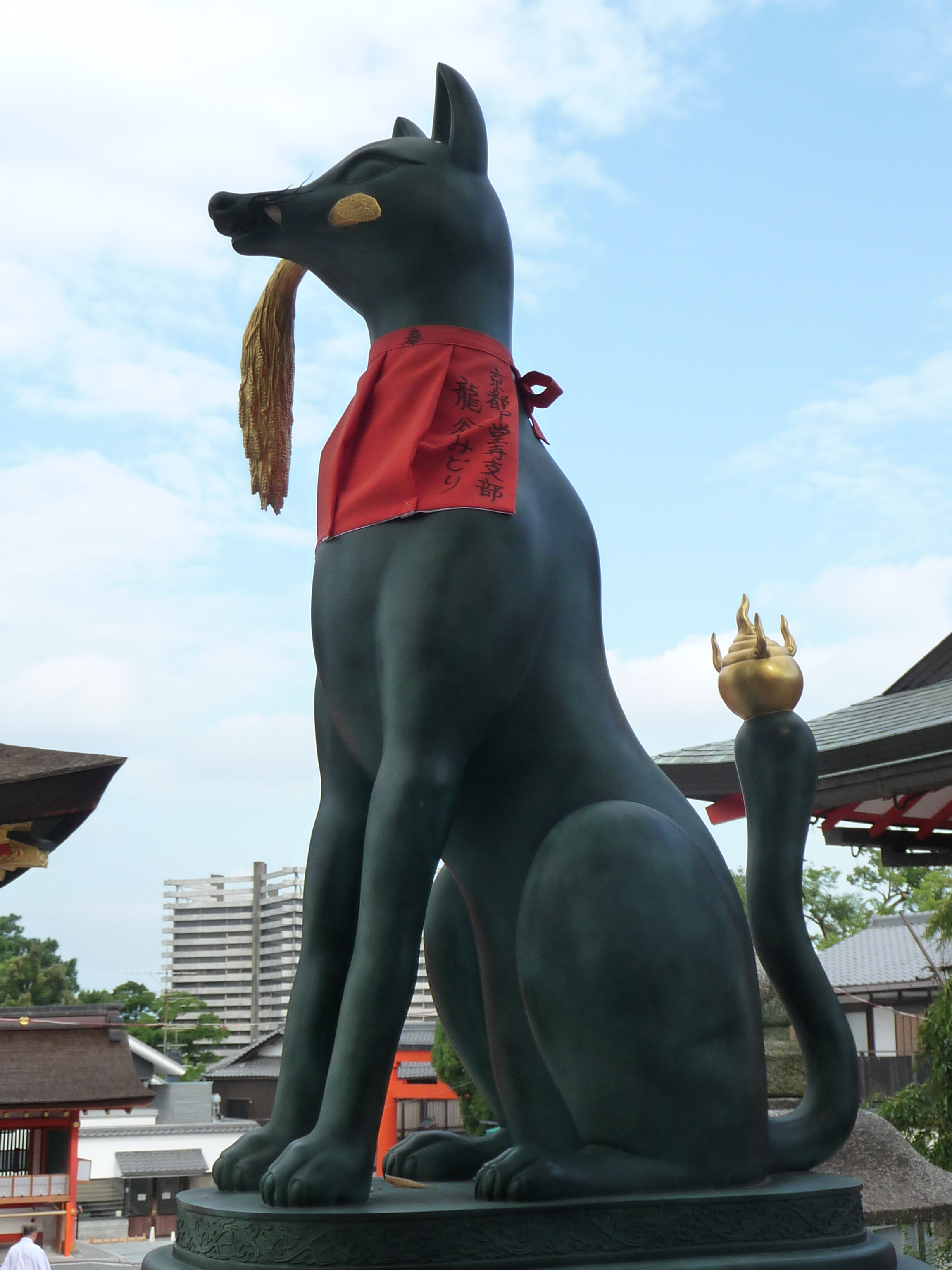 Fuchstatue in Kyoto